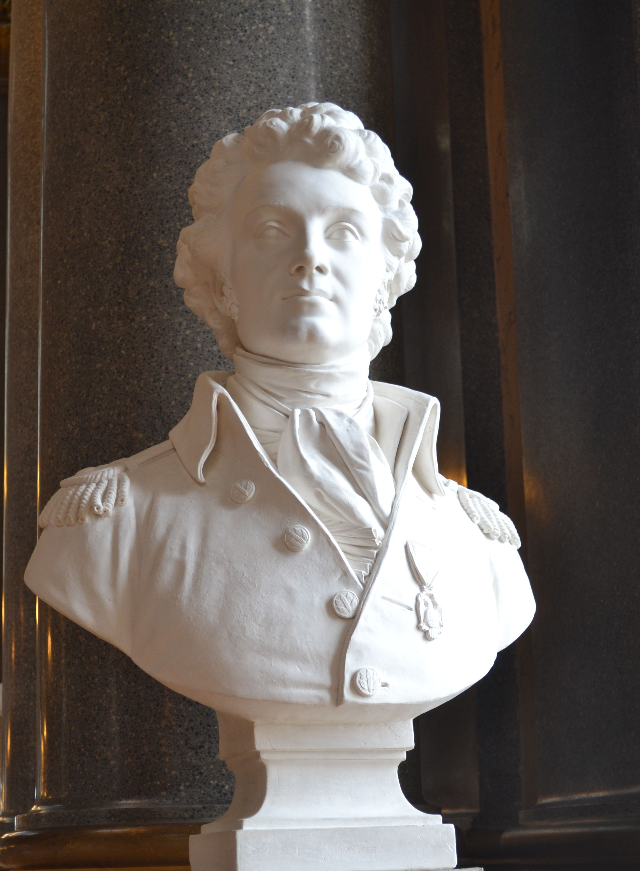 Buste de Louis Marc Antoine de Noailles, galerie des Batailles du château de Versailles.